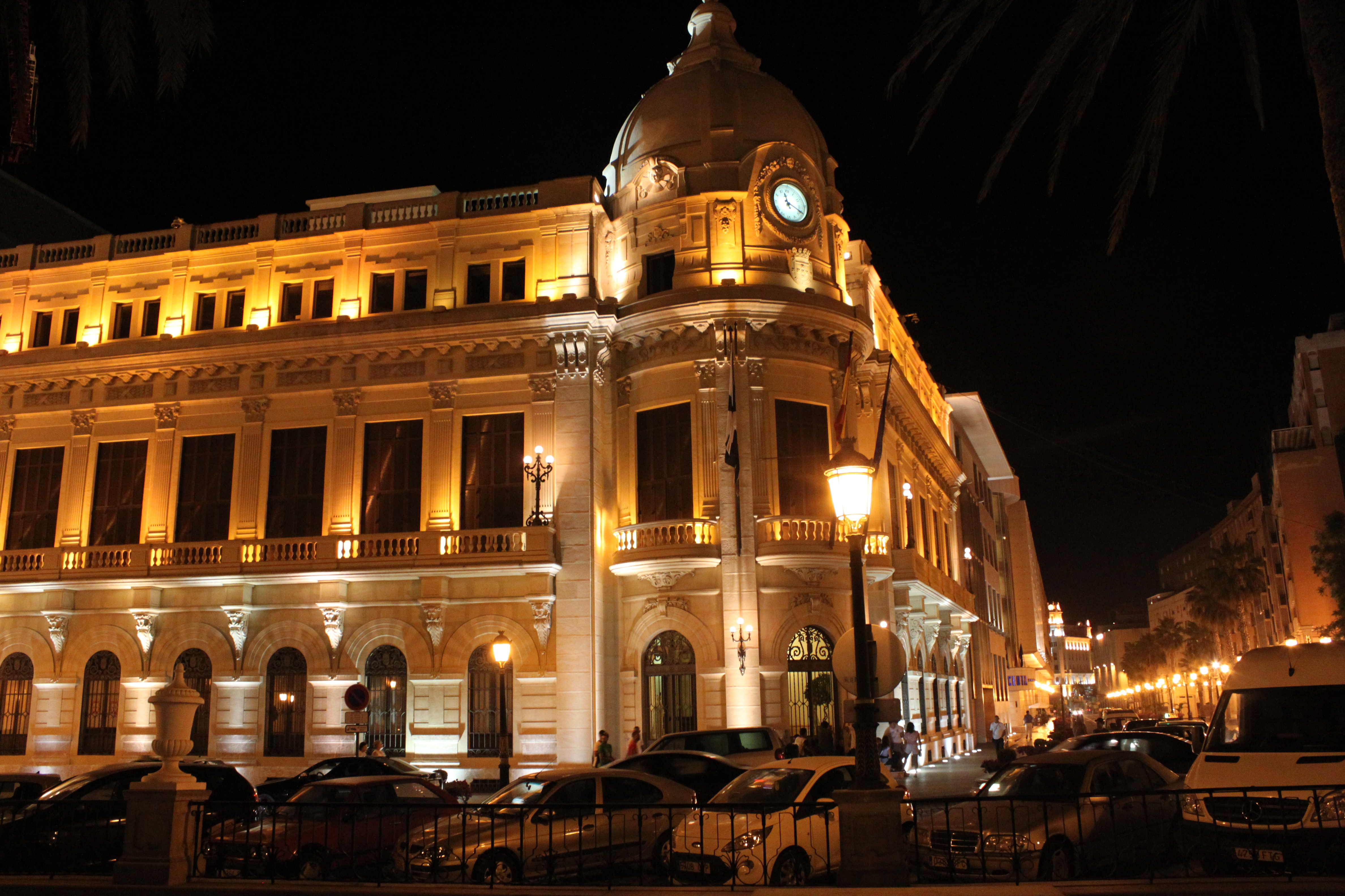 Ayuntamiento de Ceuta, de noche.